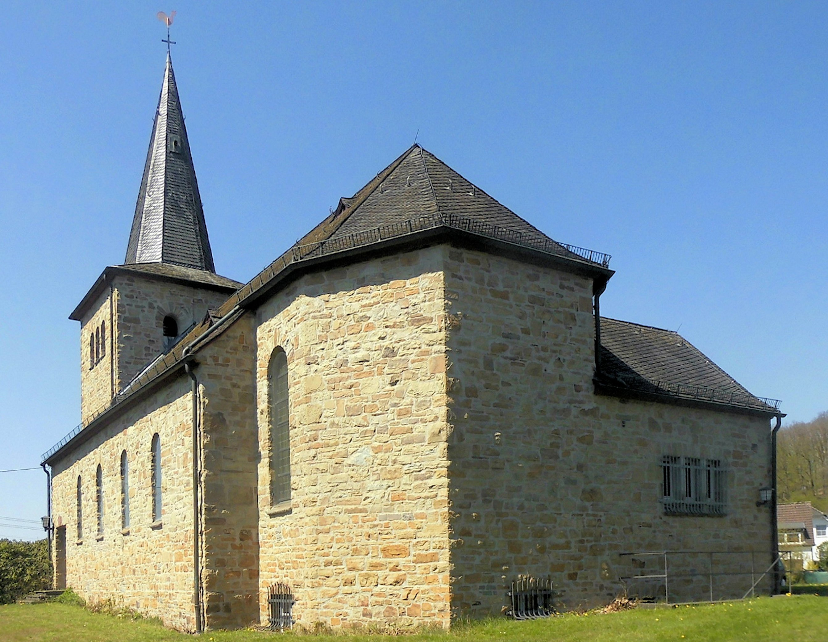 Kath. Kirche St. Konrad in Ziegenhardt, Deutschland